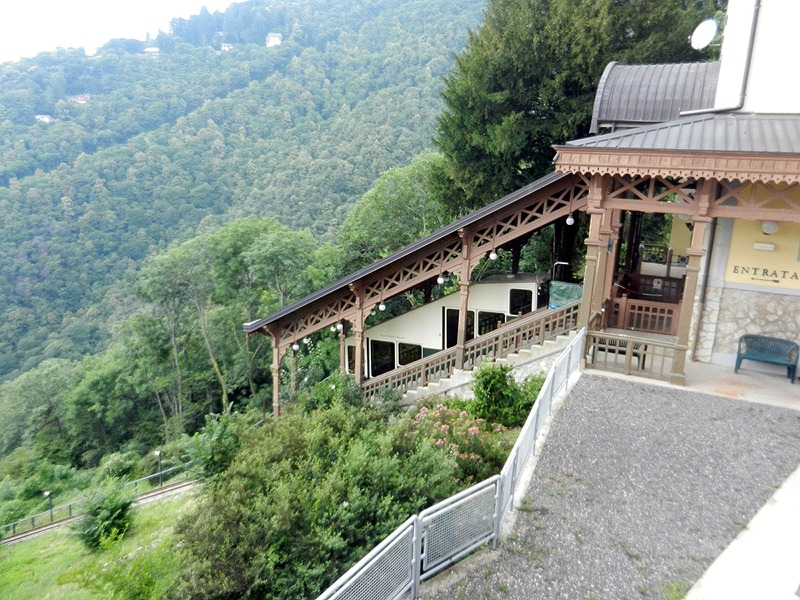 Santa Maria del Monte (Varese) - Stazione della Funicolare del Sacro Monte